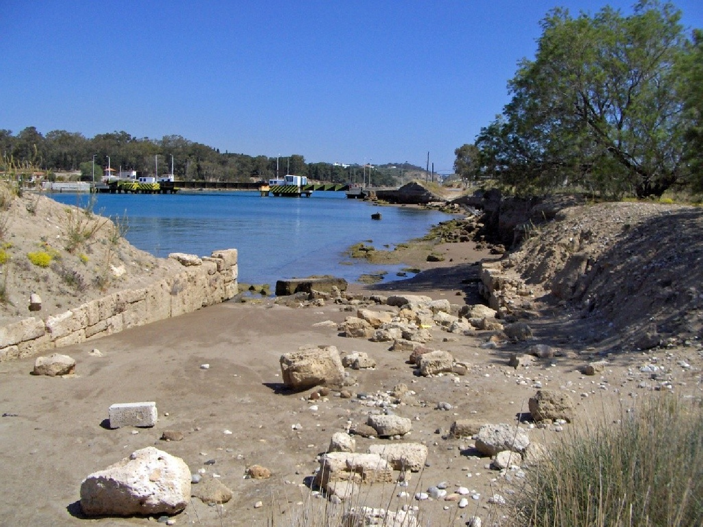 Diolkos beim Isthmos von Korinth. Stelle, an der die Schiffe an Land gezogen wurden